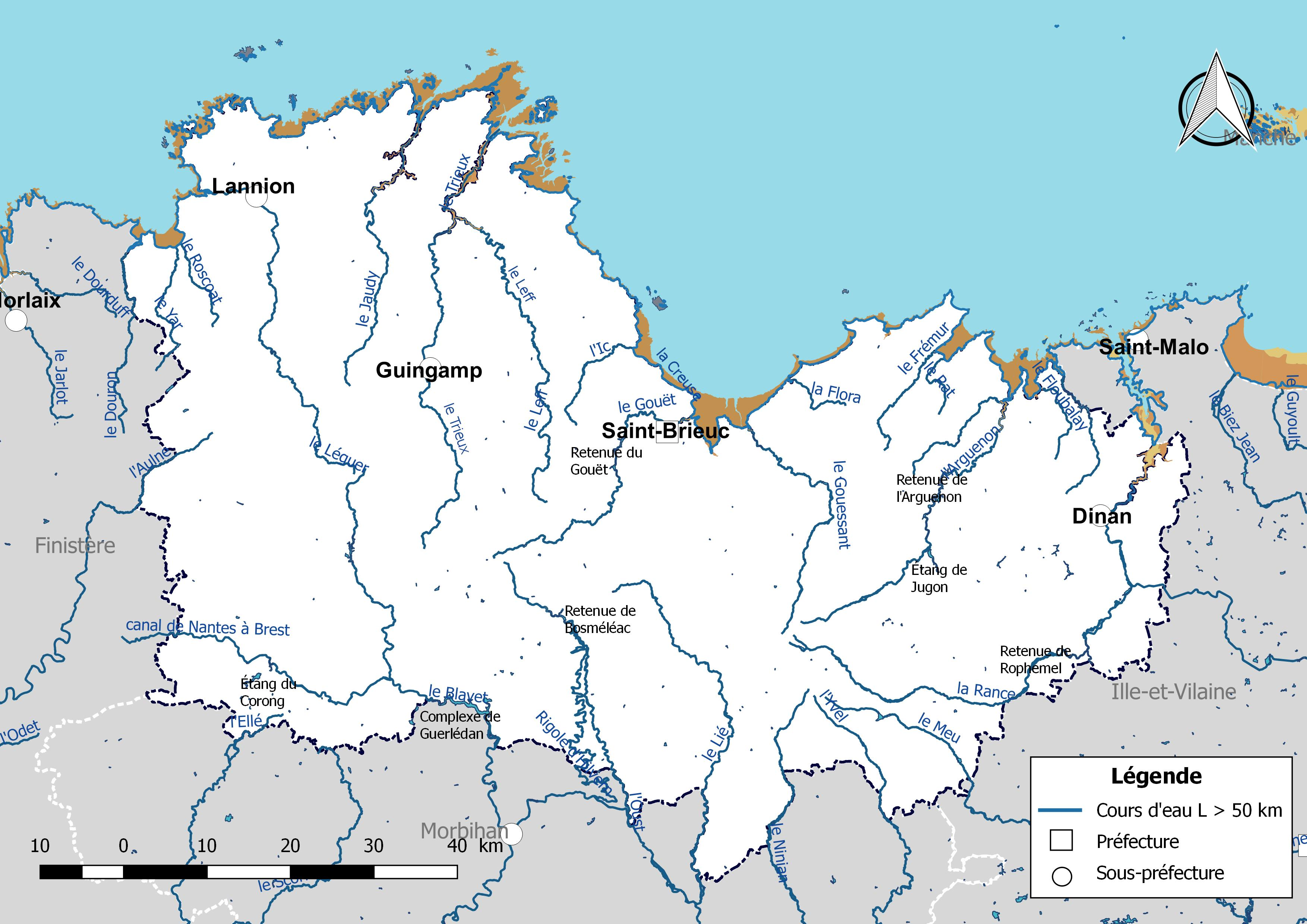 Carte des cours d'eau de longueur supérieure à 50 km drainant le département des Côte d'Armor (France).